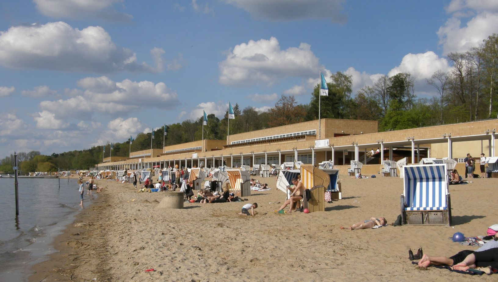 Strandbad Wannsee, Wannseebadweg, Berlin-Nikolassee